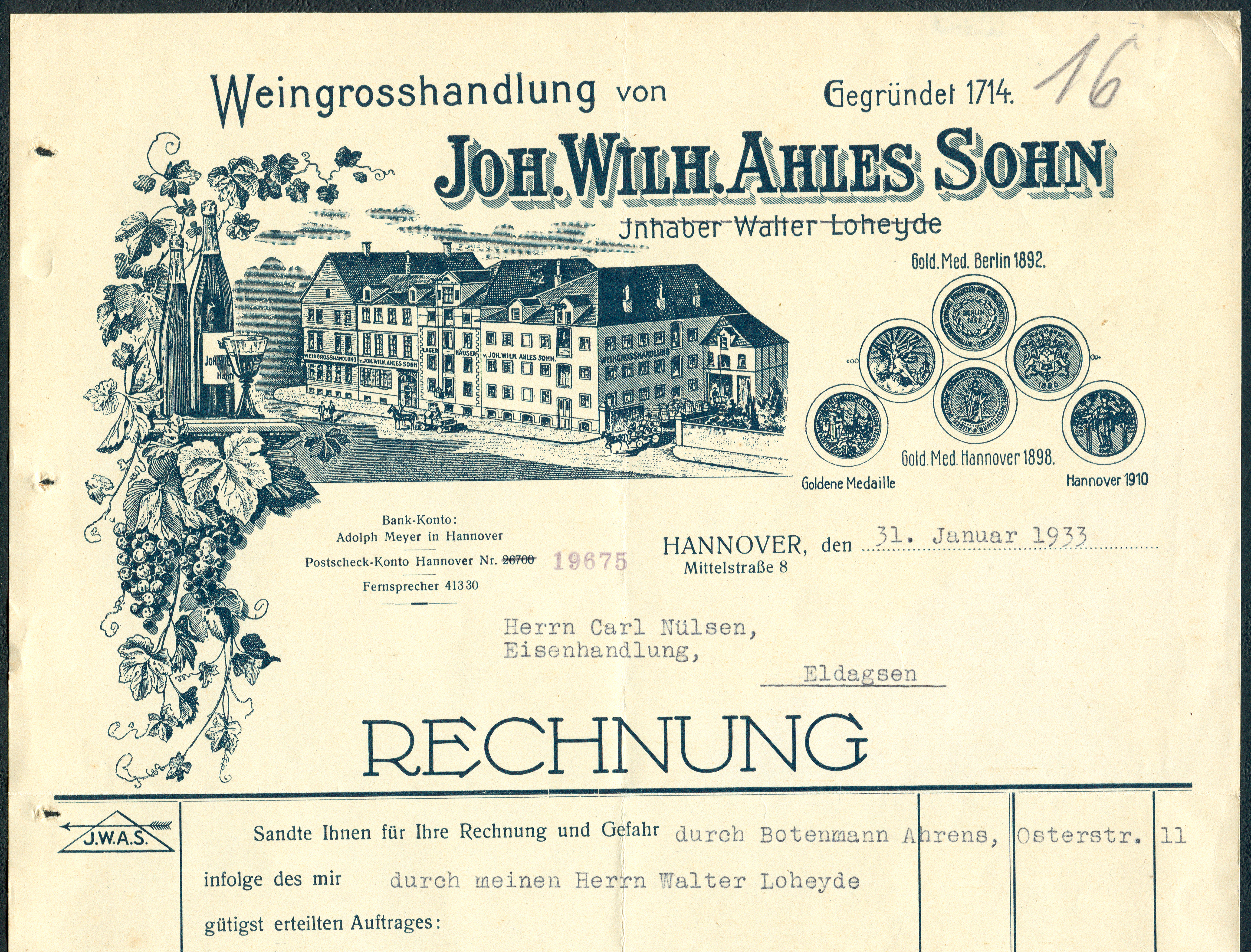 Elektronischer Ausschnitt einer Rechnung der 1714 gegründeten "Weingroßhandlung von Joh. Wilh. Ahles Sohn, Inhaber Walter Loheyde, Hannover, Mittelstraße 8". Auf dem Vordruck ist neben den Weinranken mit den Flaschen eine Gruppe aus mehreren zusammenhängenden Gebäuden zu sehen; aus einem der "Lagerhäuser" transportiert eine Pferdekutsche Weinfässer hinaus. Abgebildet sind drei betitelte Goldene Medaillen mit Vor- und Rückseite; aus Berlin 1892 und aus Hannover 1898 sowie von 1910. Per Schreibmaschine datiert der - ältere - Vordruck (ohne Signatur oder andere Hinweise auf den Kupferstecher) mit dem Nummern-Stempel "19675" auf den 31. Januar 1933. Durch die Eisenhandlung von Carl Nülsen in Eldagsen wurde mit Bleistift die Beleg-Nummer 16 oben rechts hinzugefügt. Das Blatt, etwas breiter als DIN A4, ist ohne Wasserzeichen und ohne Druckerkennung ...